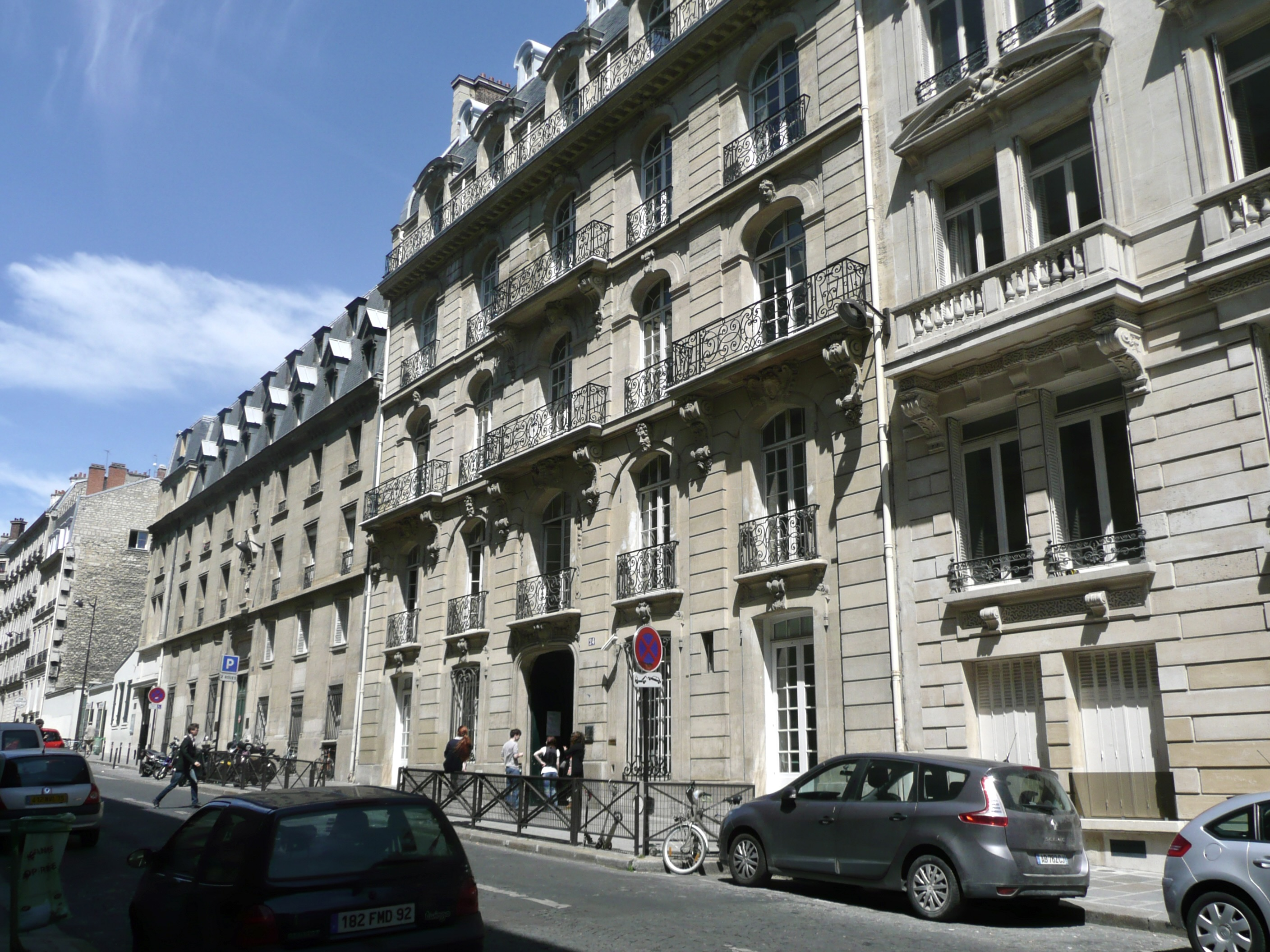 Voici l'immeuble du Lycée Fénelon Sainte-Marie, 24 rue du Général Foy 75008 Paris